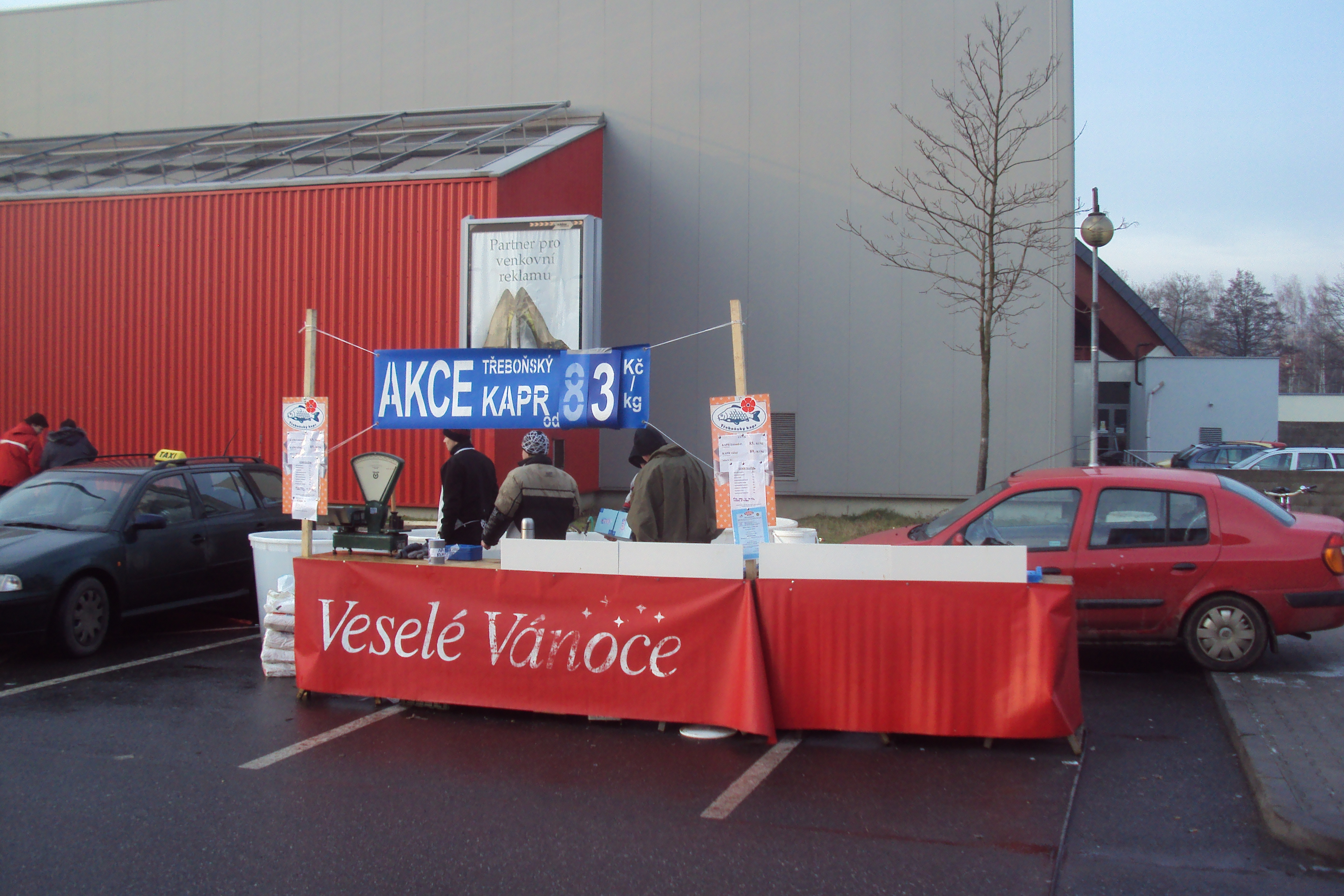 Pouliční prodej kaprů vedle Kauflandu Česká Lípa